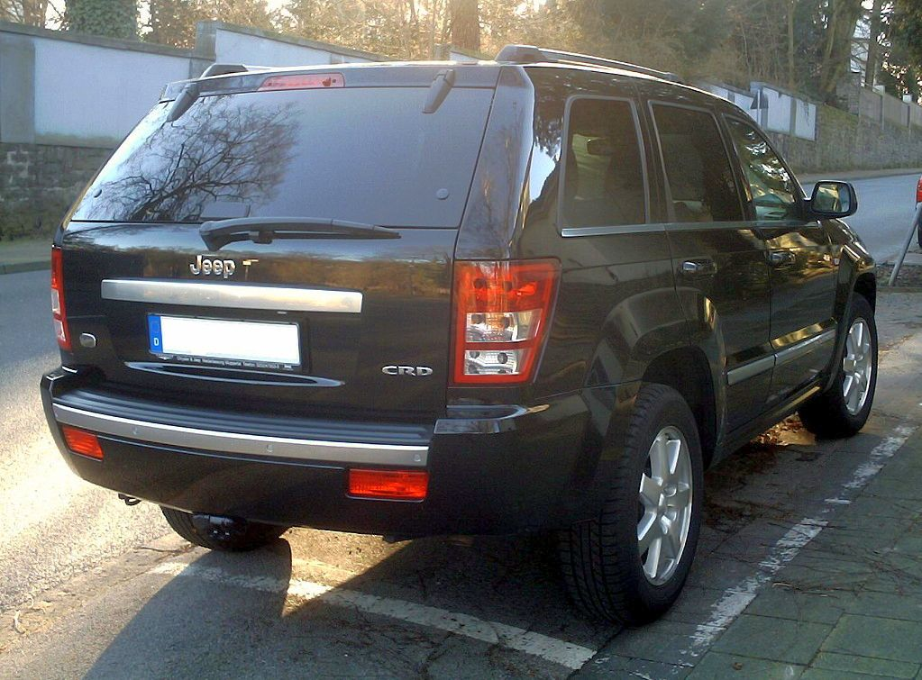 Jeep Grand Cherokee